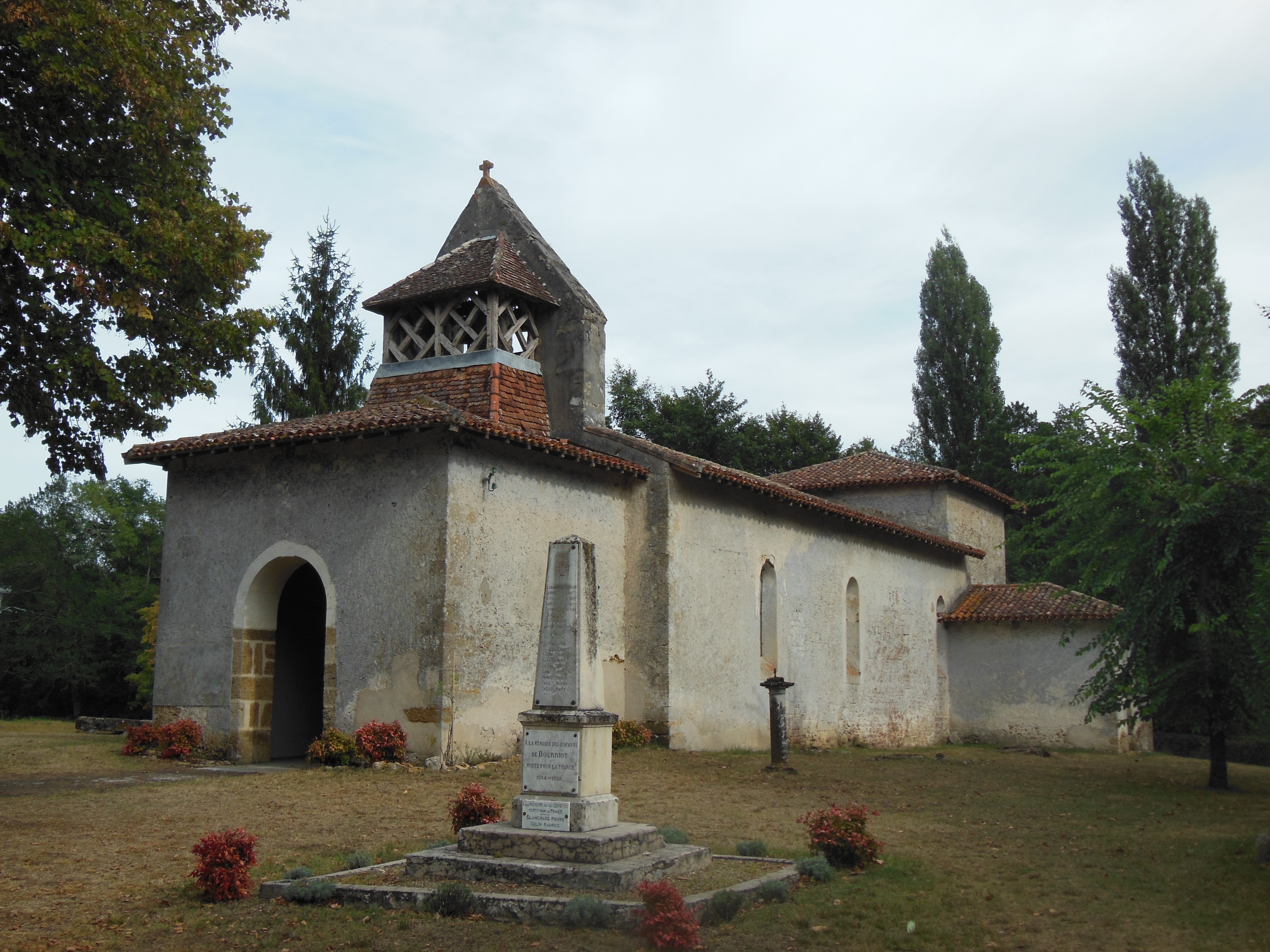 Eglise Saint-Martin de Bourriot, à Bourriot-Bergonce, dans le département français des Landes.